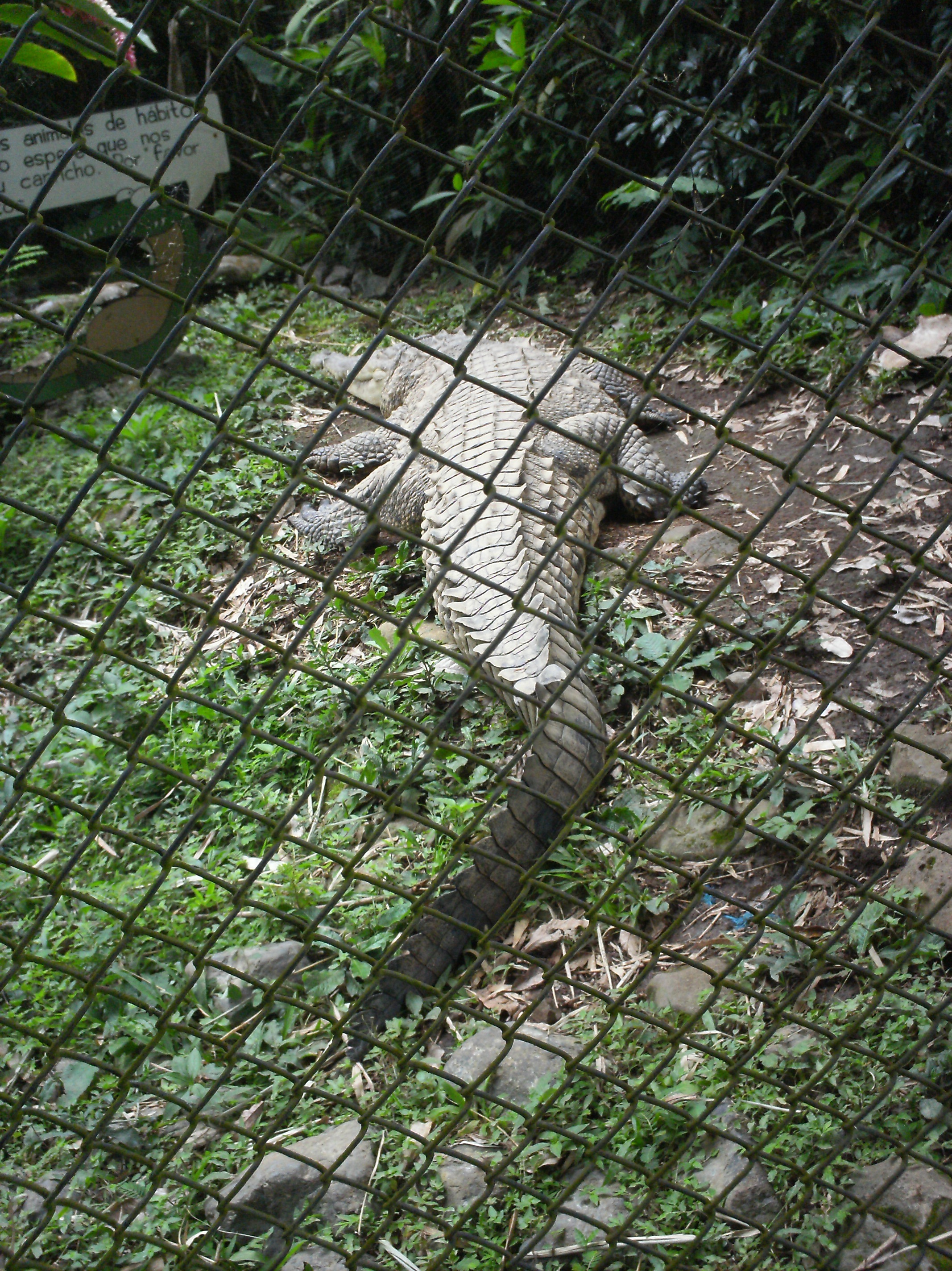 Cocodrilo americano en su entorno dentro del, Alajuela, Costa Rica